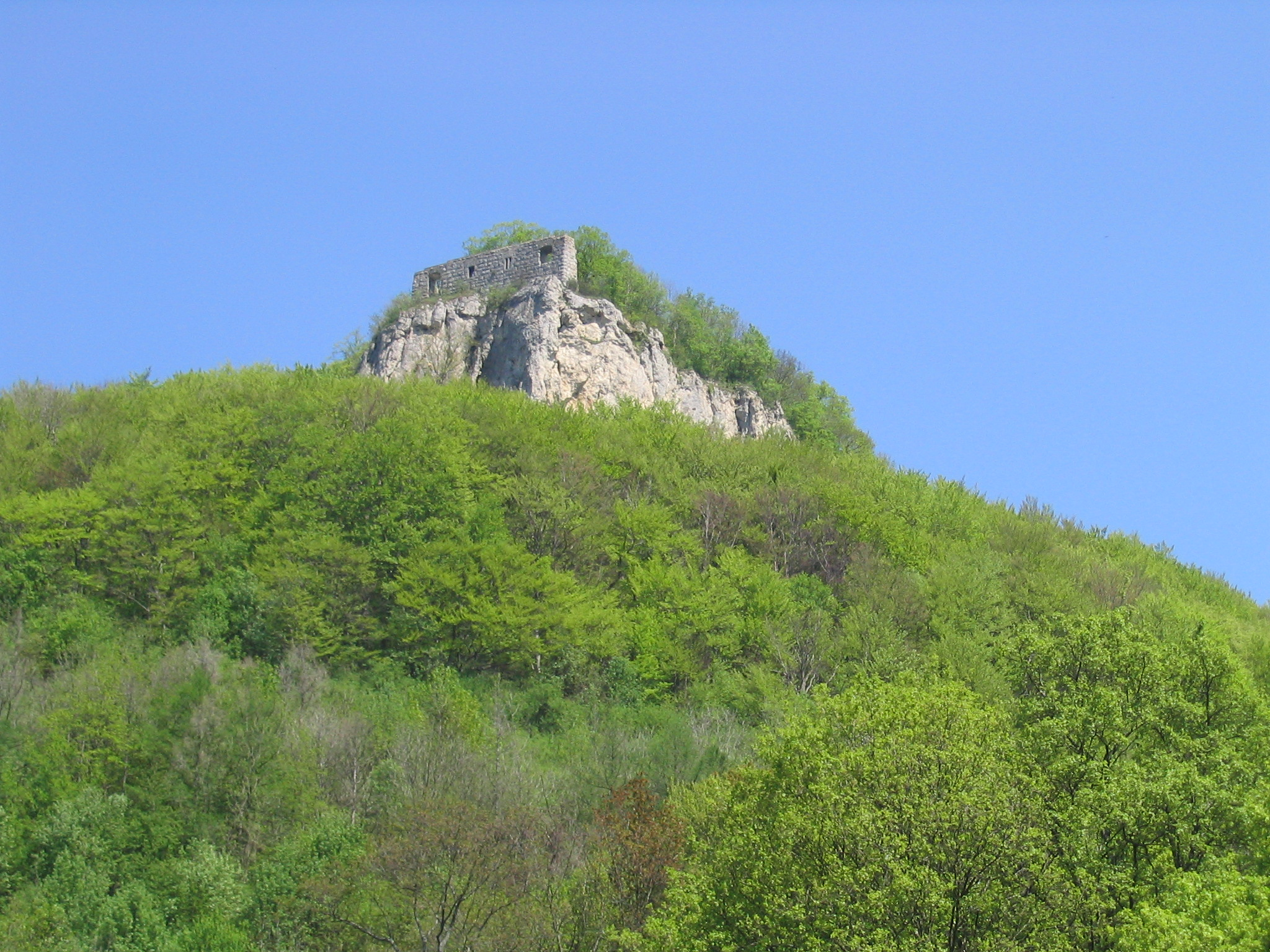 Rosenstein near Heubach (Swabian Jura/Schwäbische Alb)